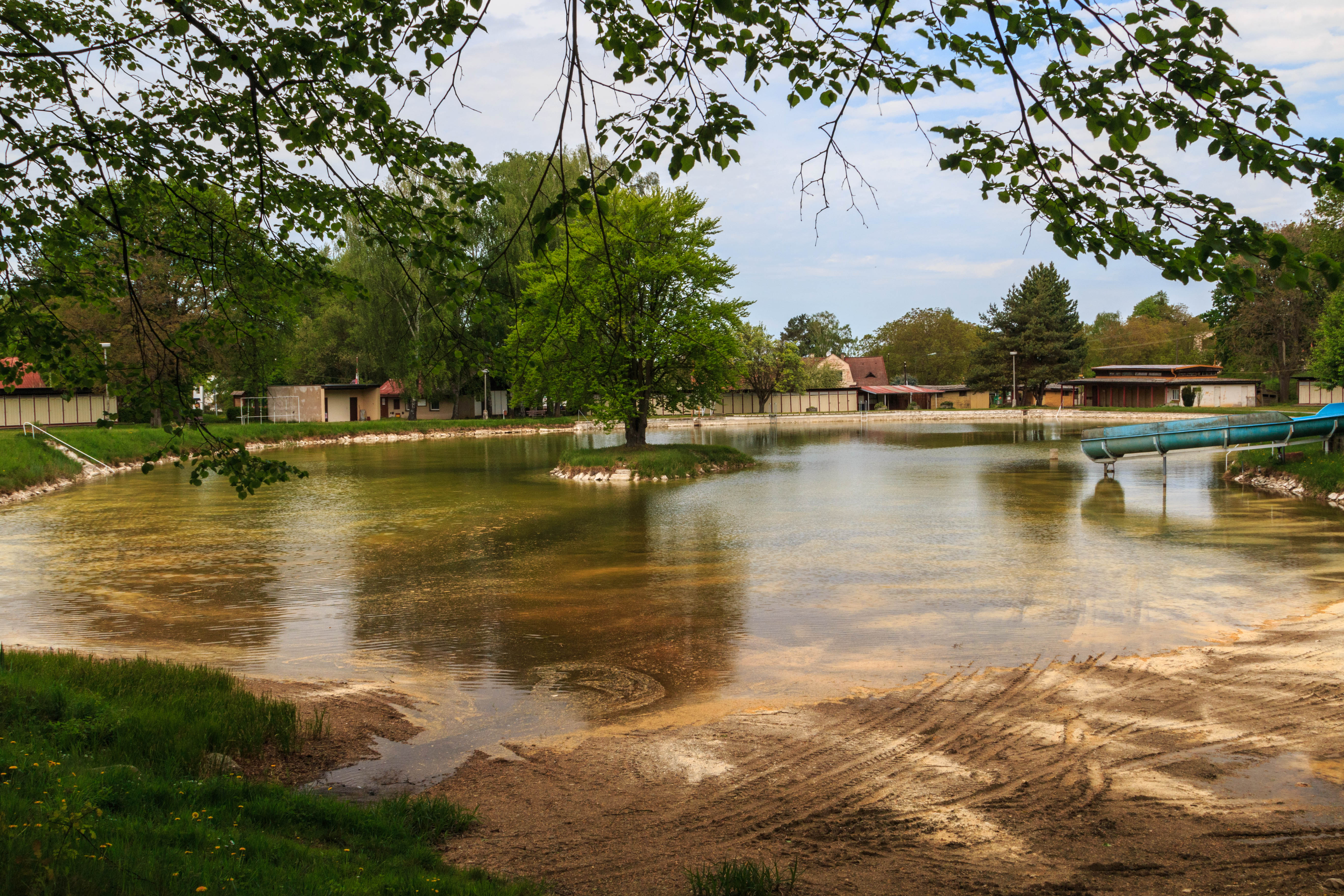 Koupaliště v Konopáči Project: Vodstvo.